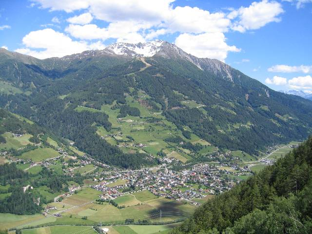 Blick auf Matrei i.O. von Nordwesten, Aufnahmeort vermutl. in der Nähe des Strumerhofs